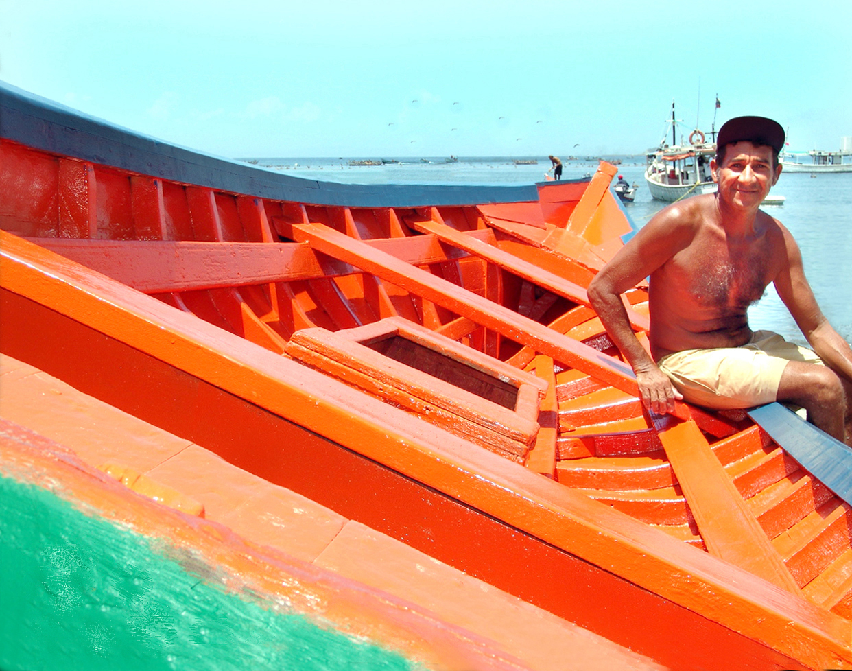 Playa Pampatar, Margarita, Nueva Esparta, Venezuela.